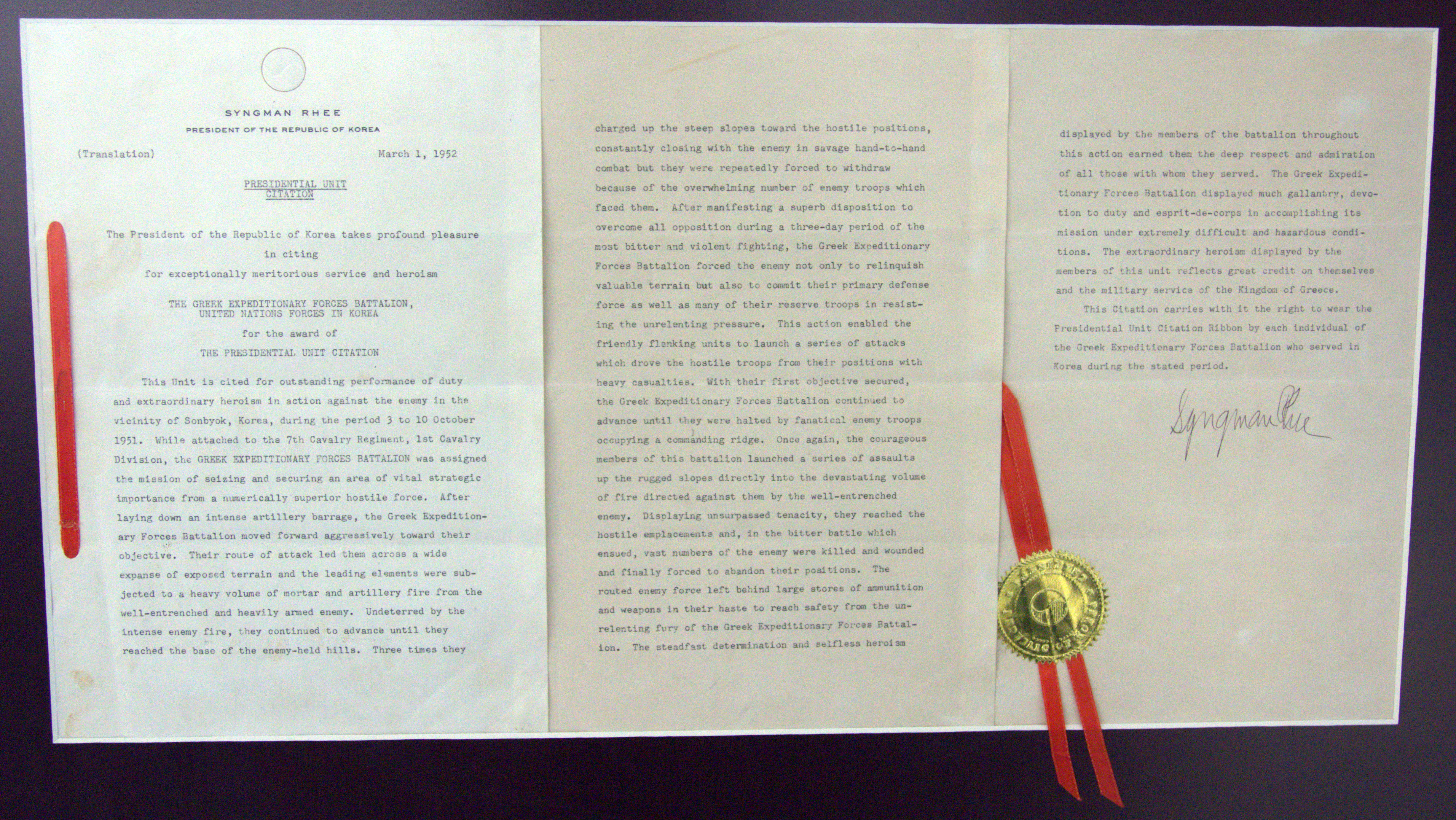 Hellenic War Museum (Athens, Greece). --- Ελληνικό Εκστρατευτικό Σώμα Κορέας. Πολεμικό Μουσείο Ελλάδος. Αθήνα.